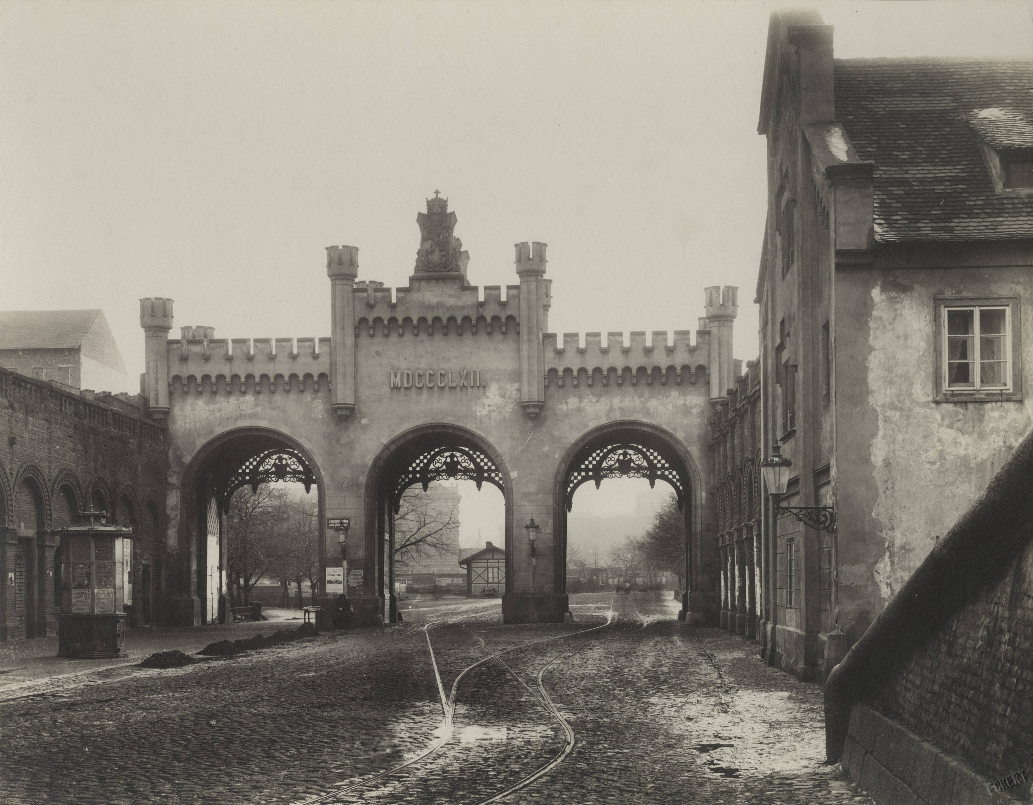 Nová Újezdská brána (zbořena 1891). Bránou prochází trať koňky.